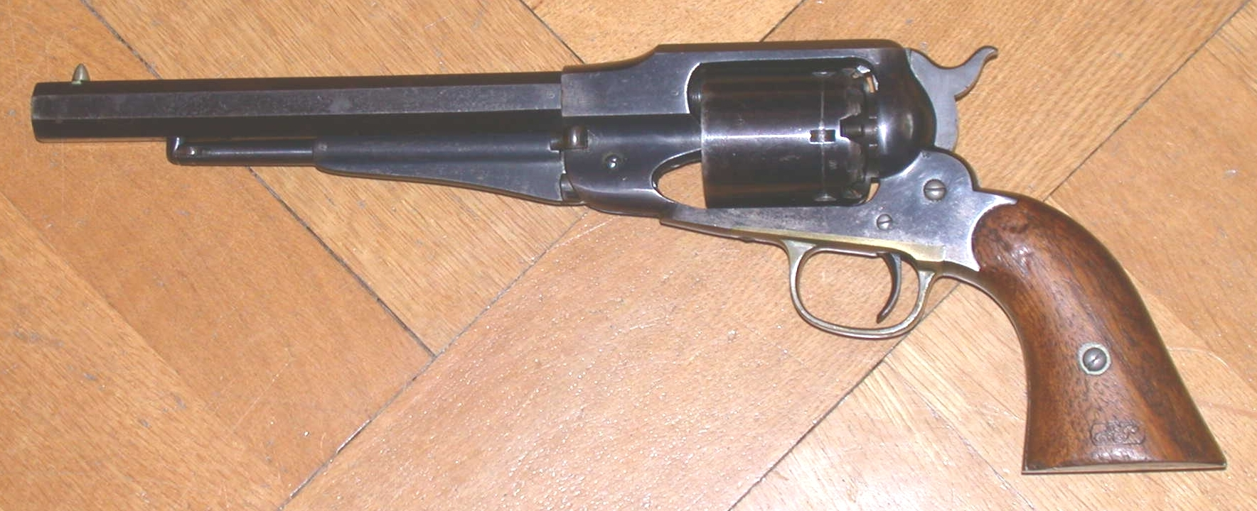 Remington New Model Army, hergestellt ab 1863, nach dem Colt 1860 Army häufigster Revolver im Amerikanischen Bürgerkrieg